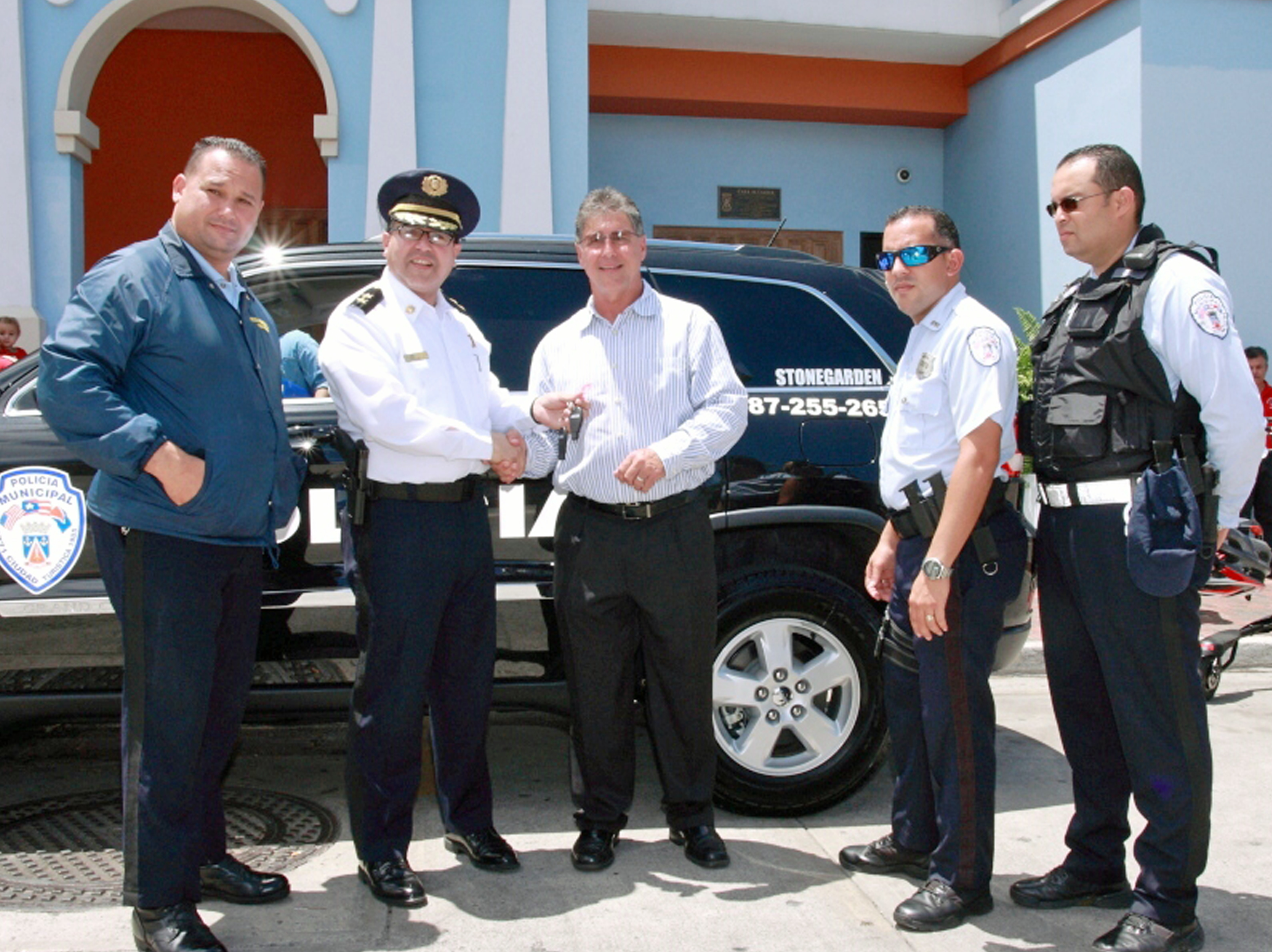 El Alcalde de Cabo Rojo y oficiales de la Policía Municipal.